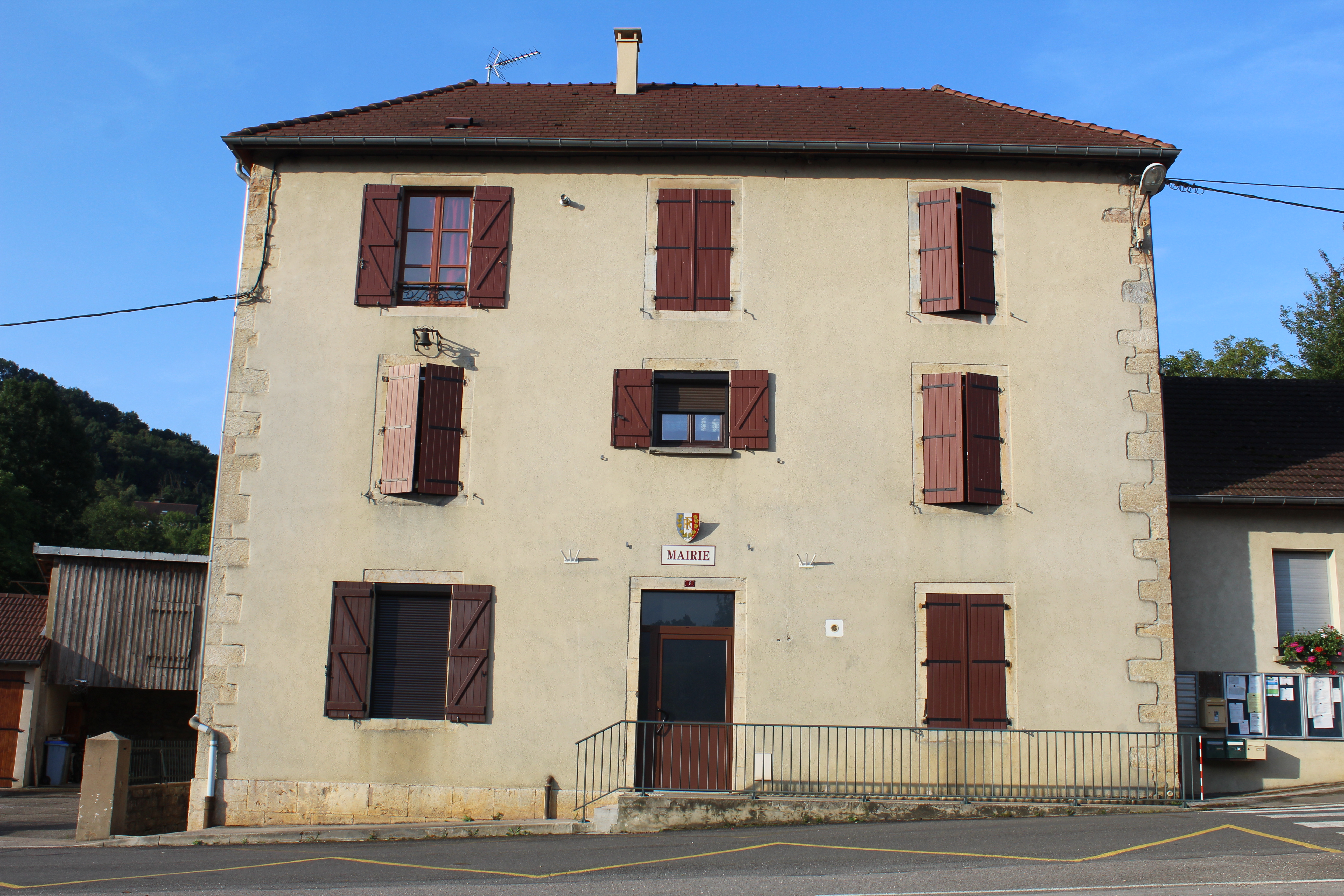 Mairie de Digna.